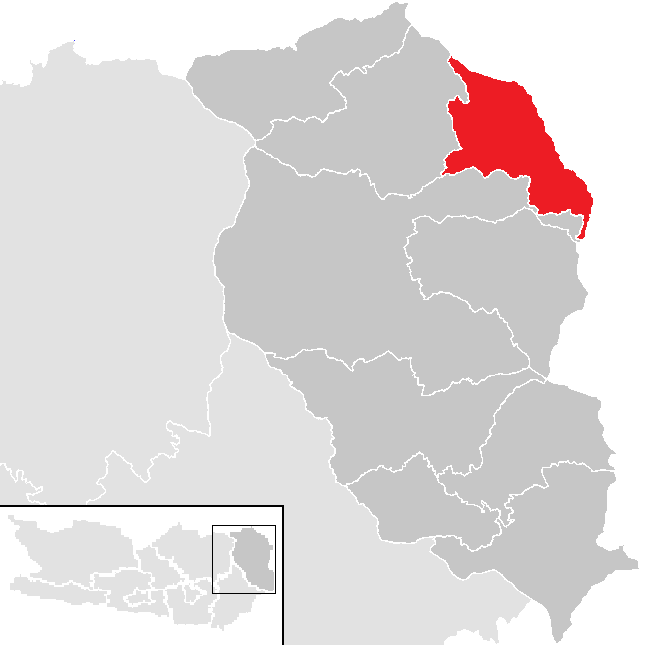 Bezirk Wolfsberg